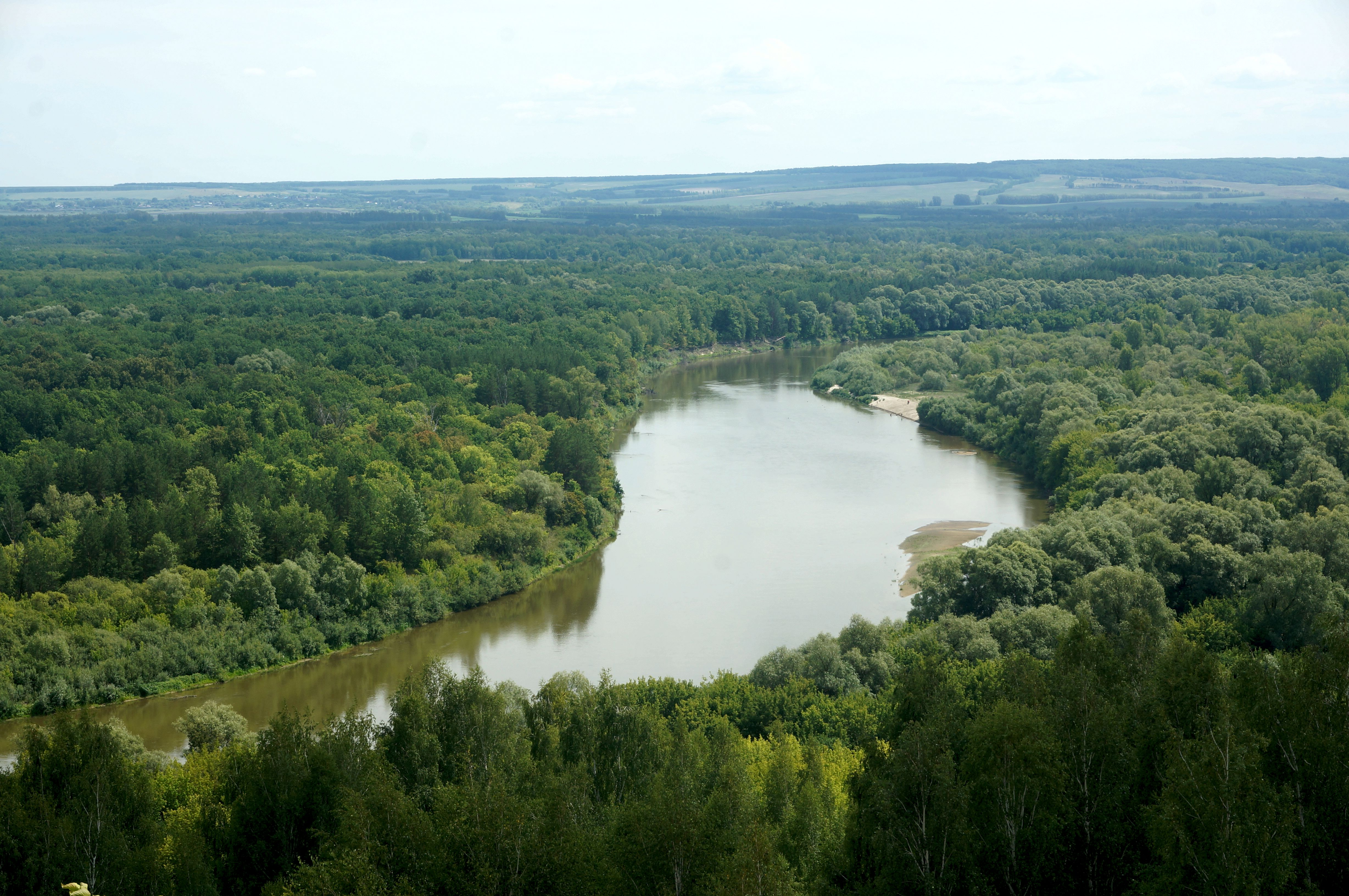 Река Сура. Вид с Никольской горы у посёлка Сурское, Ульяновская область, Россия